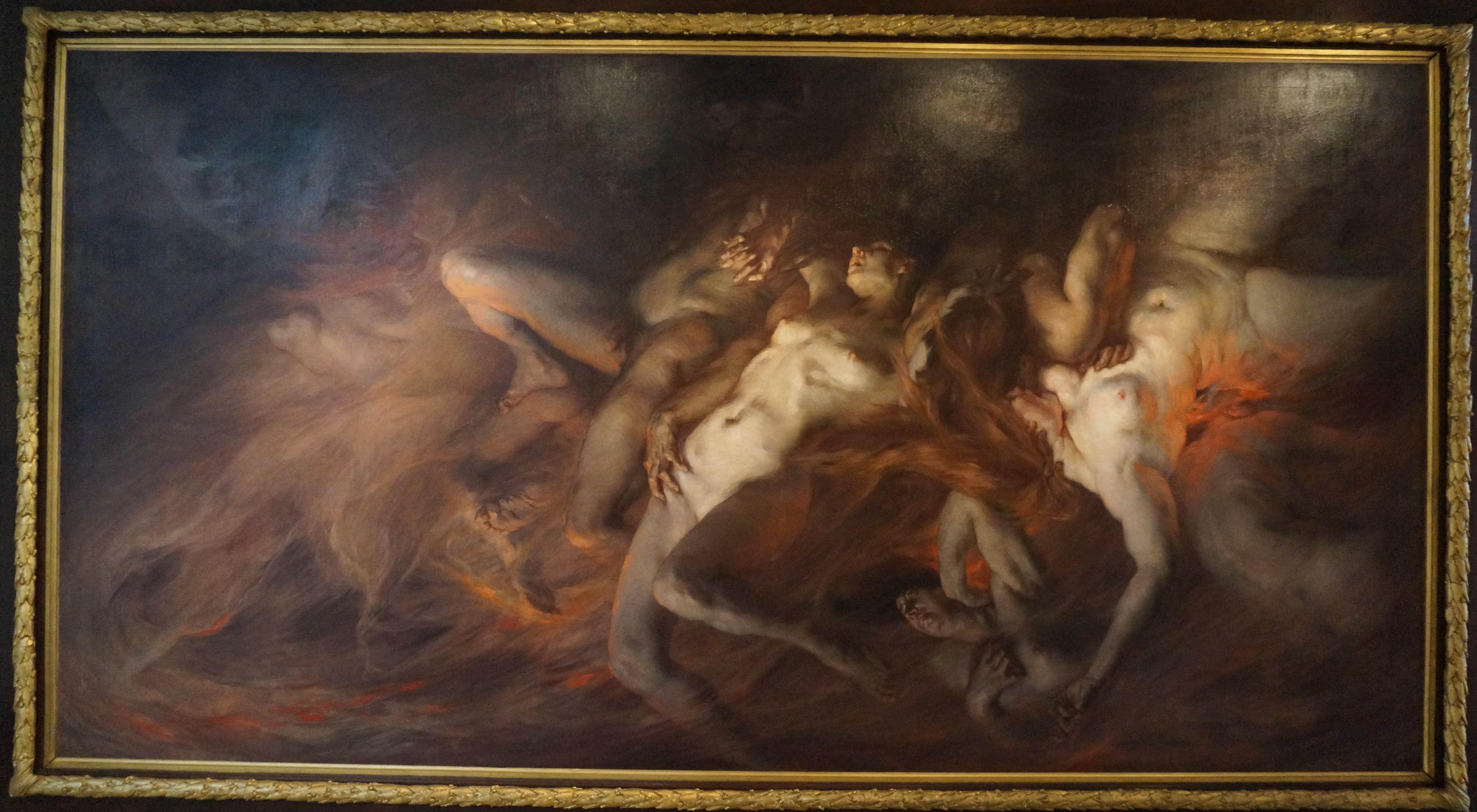 de Victor Prouvé au musée des Beaux-Arts de Nancy. Exposé au salon de 1889, huile sur toile.